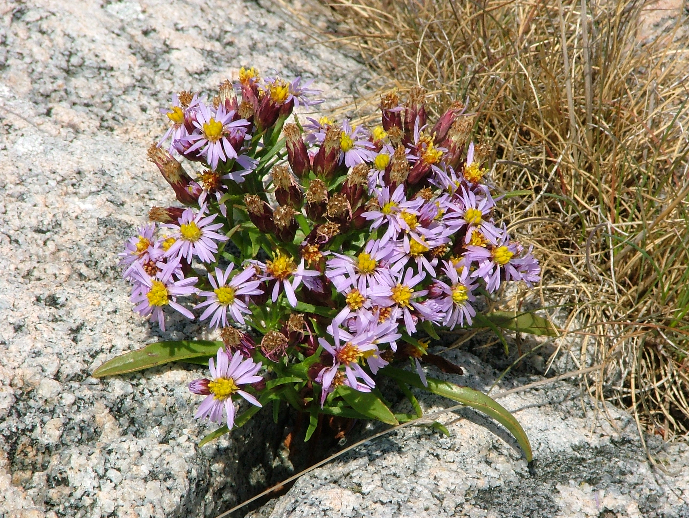 Tripolium pannonicum ssp. maritimum = Tripolium pannonicum subsp. tripolium [1]